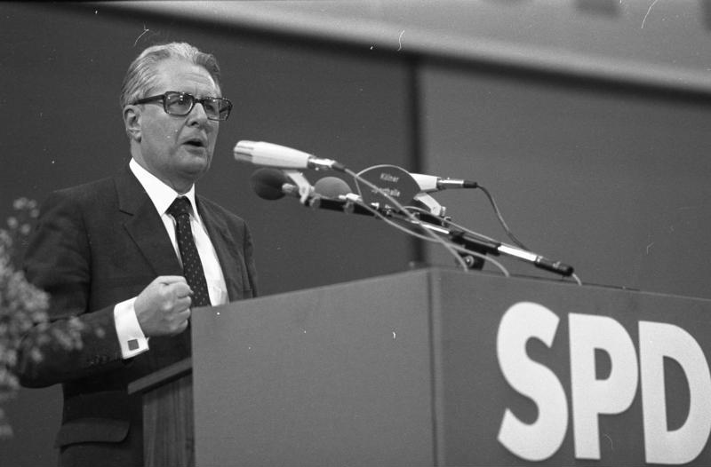 28.2.1983 SPD-Wahlkundgebung mit Kanzler-Kandidat Dr. Hans-Jochen Vogel in der Kölner Sporthalle